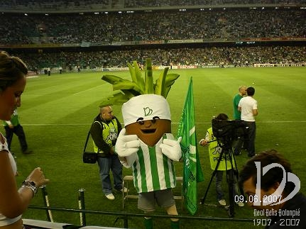 Mascota Betis